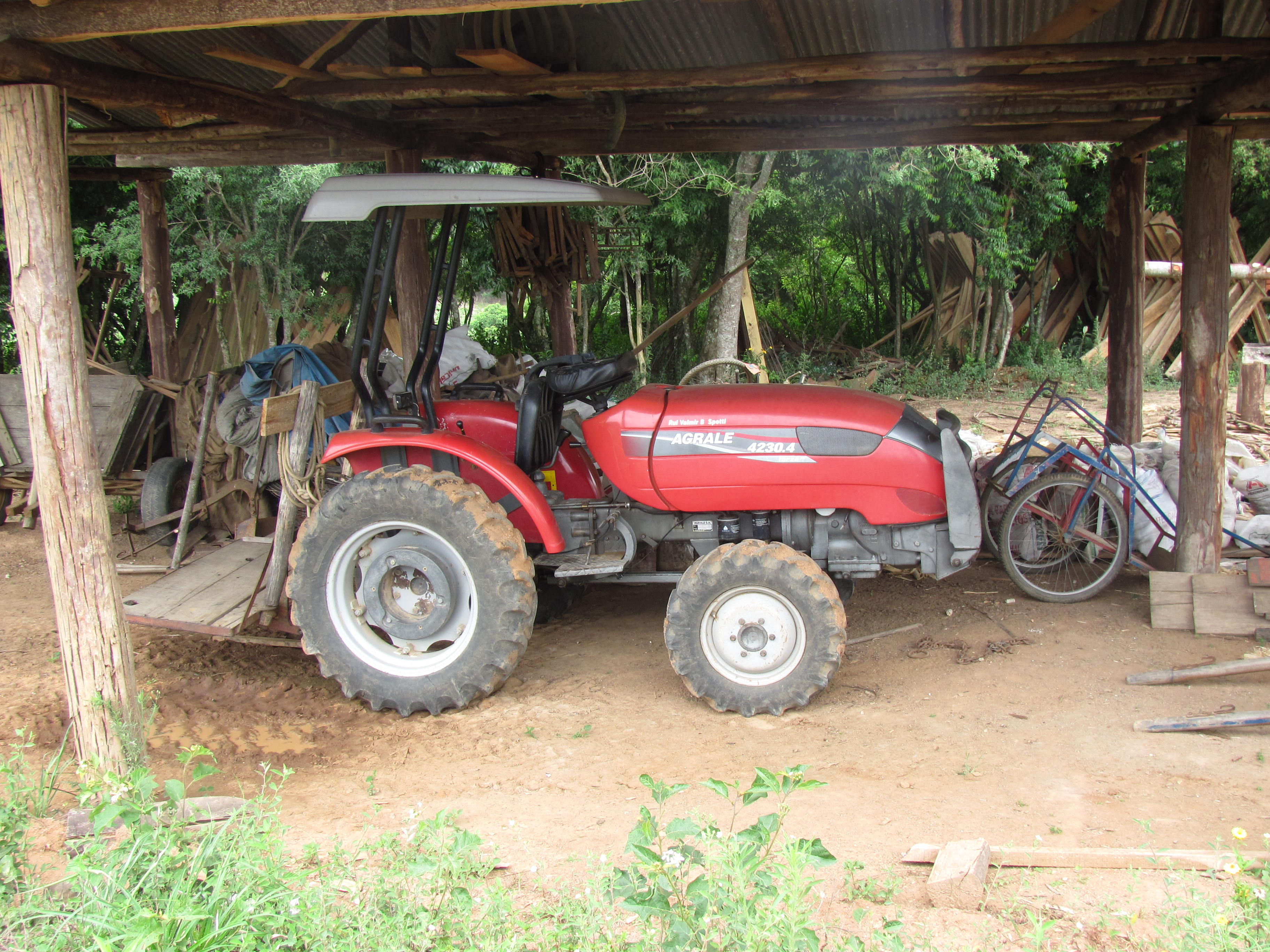 Agrale 4230.4 trator em Mariana Pimentel